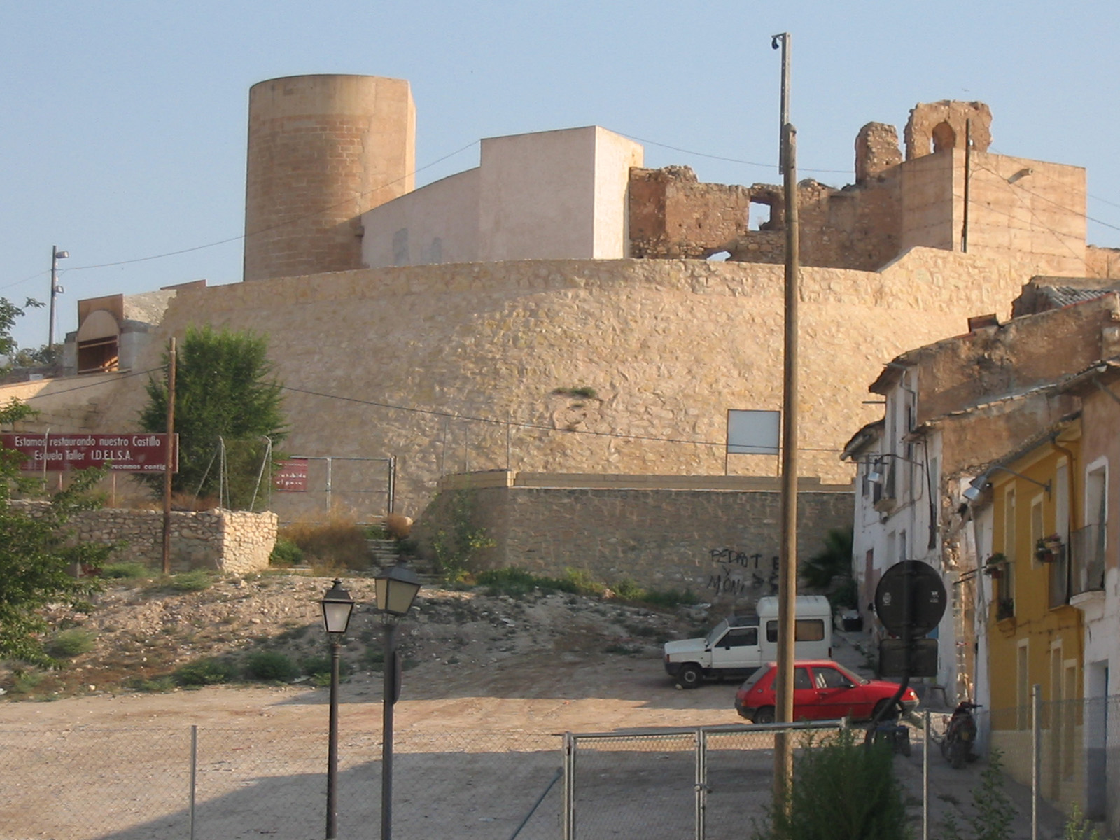 Fotografía del Castillo de Elda desde el parque junto a la Iglesia de Santa Ana de Elda, Alicante, España. Se pueden apreciar las labores de restauración del Castillo.